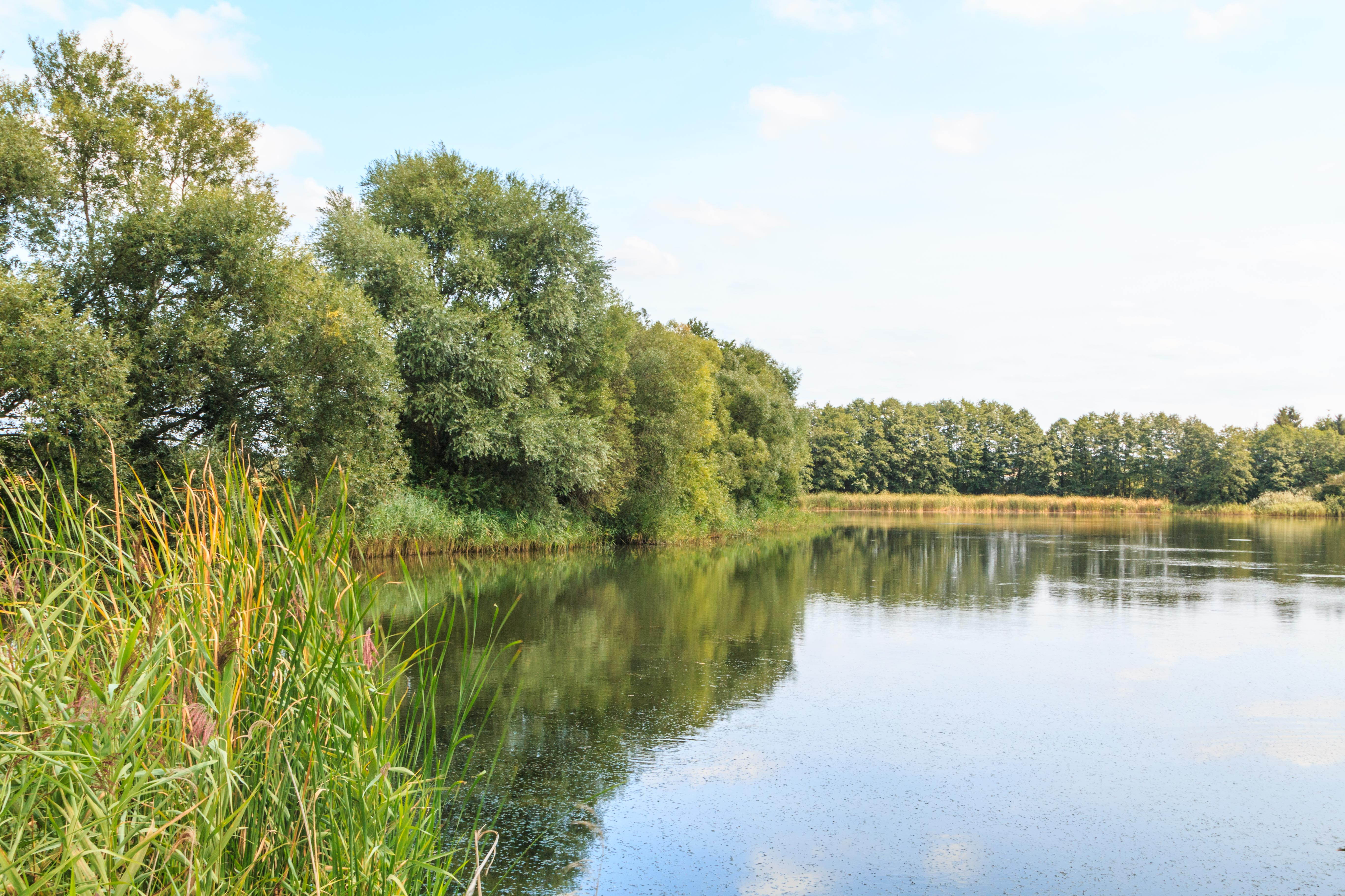 Rybník Netušil u Slatiny u Vysokého Mýta